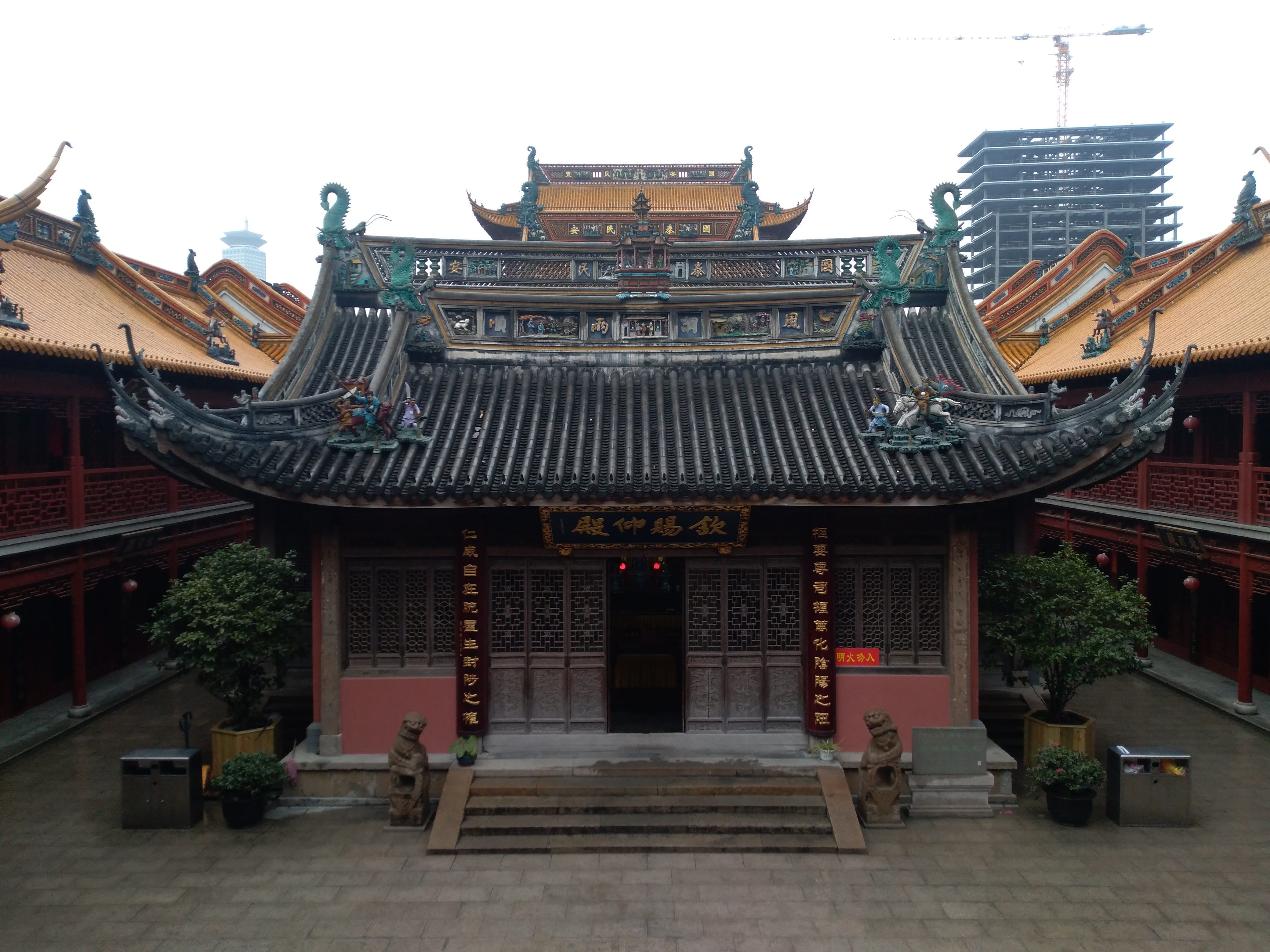 钦赐仰殿 上海市浦东新区源深路476号